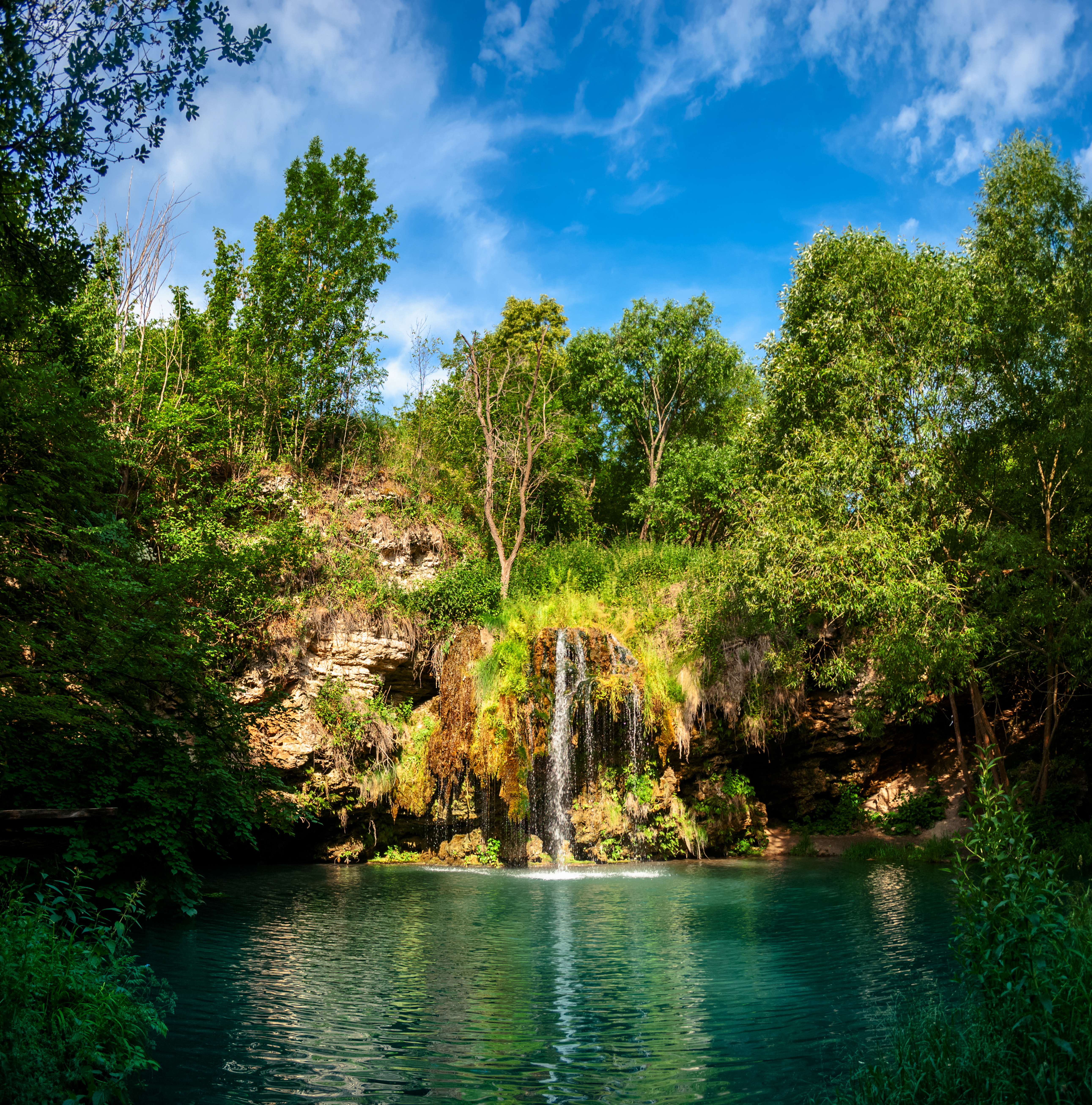 Бобровицький, Дунаєвецький район, між селами Лисець та В. Побійна у долині р. Бобровець Водоспад Бурбун. Загальна Панорама